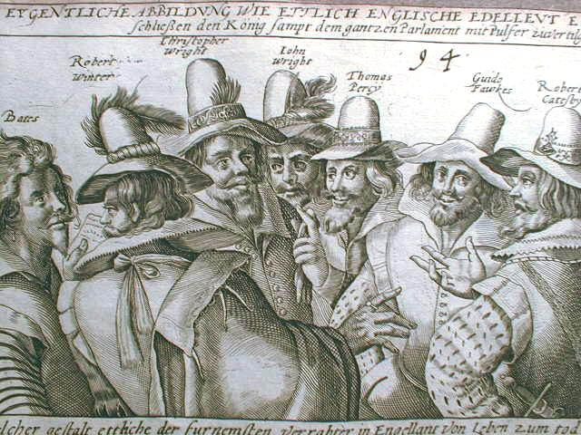 Ausschnitt Guy Fawkes (1570-1606) (6. v. l.) und die Mitverschwörer des Gunpowder Plot; auf dem Bild fehlt Thomas Winter (rechts neben Robert Catesby); Titel: DIE EIGENTLICHE ABBILDUNG ZEIGT WIE ETLICHE ENGLISCHE EDELLEUTE EINEN RAT schließen um den König samt dem ganzen Parlament mit Pulver zu vernichten.